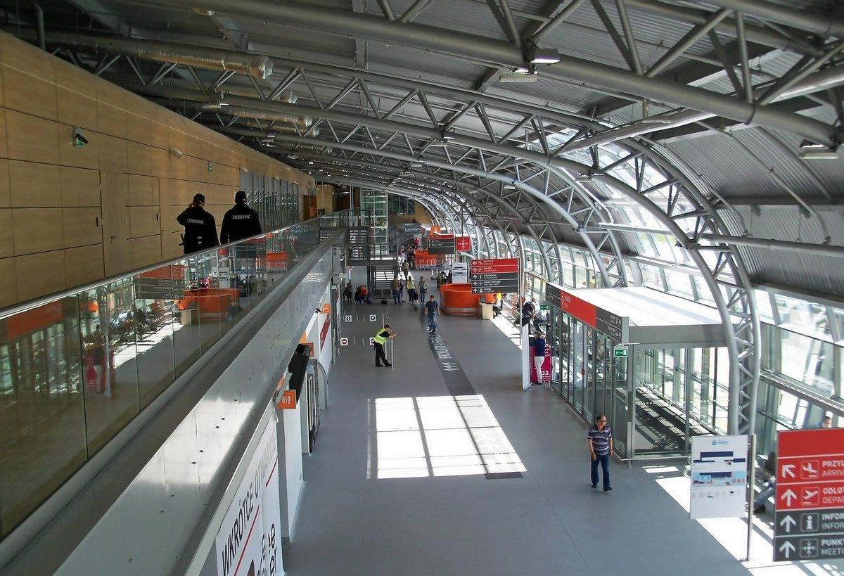 Wnętrze terminalu lotniska Modlin widziane z antresoli w kierunku wschodnim